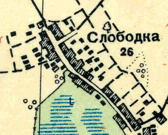 Топографическая карта Ленинградской области, квадрат О-35-24-А-а (Клясина), деревня Слободка